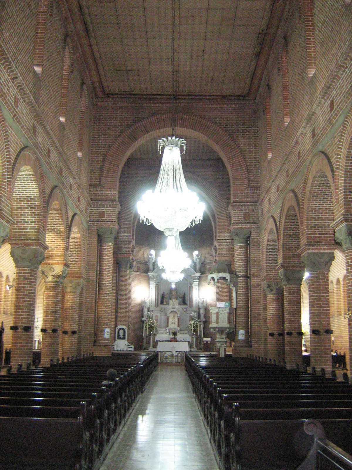 Catedral de Nuestra Señora del Rosario de Girardota, Antioquia, Colombia.